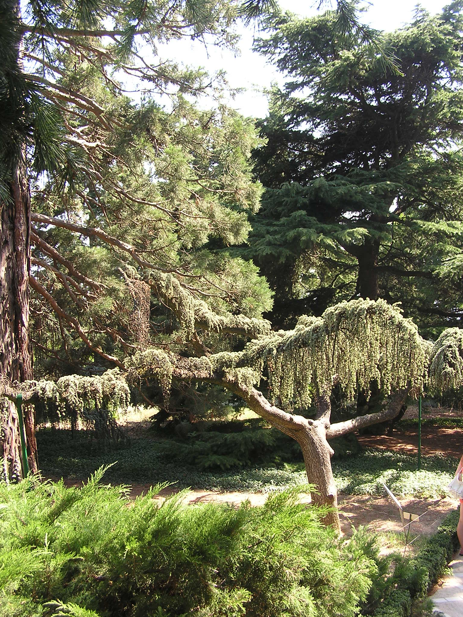 Никитский ботанический сад